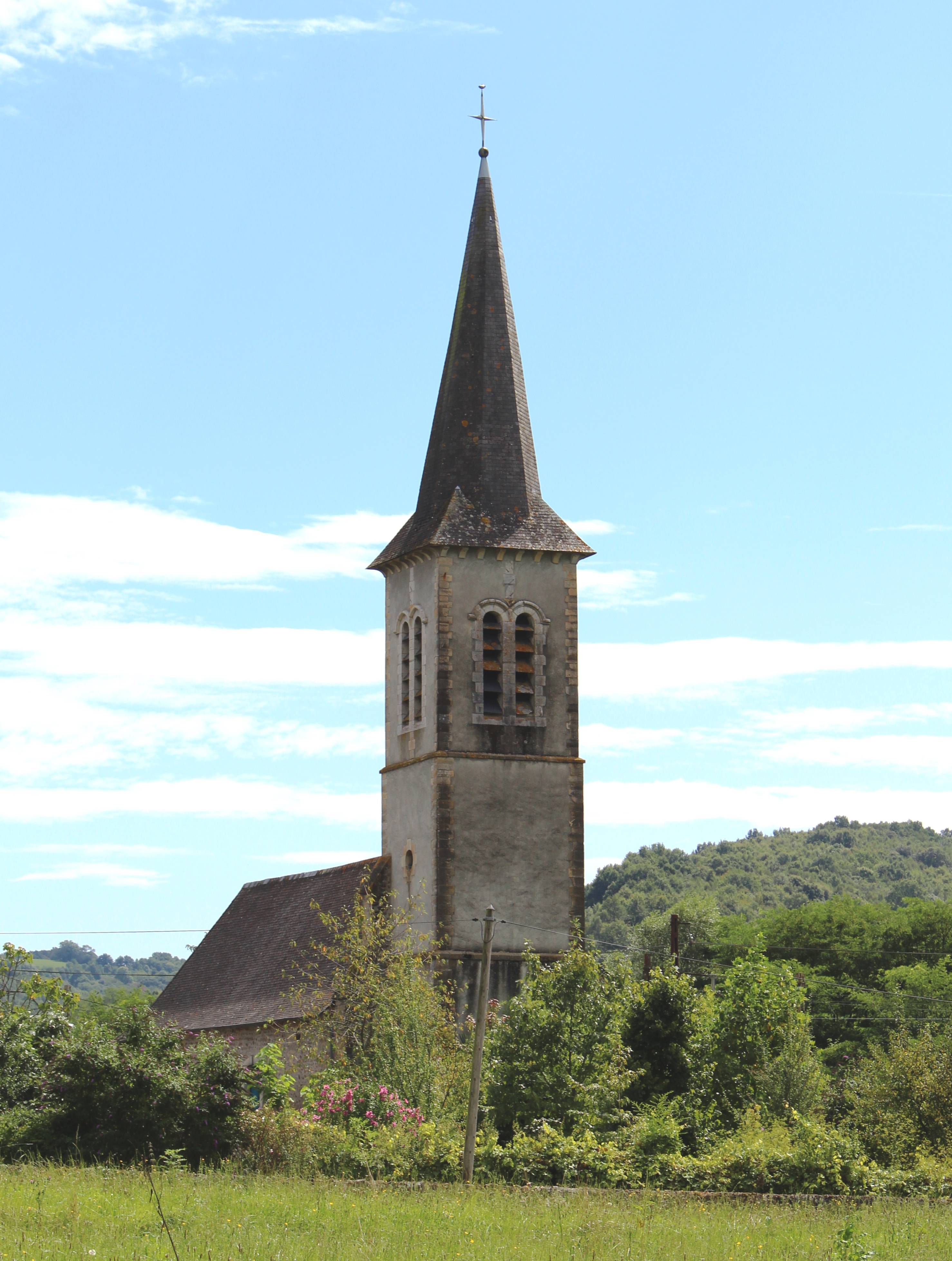 Église Saint-Pierre de Lanespède (Hautes-Pyrénées)